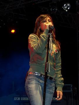 Anna Tatangelo in suo concerto.